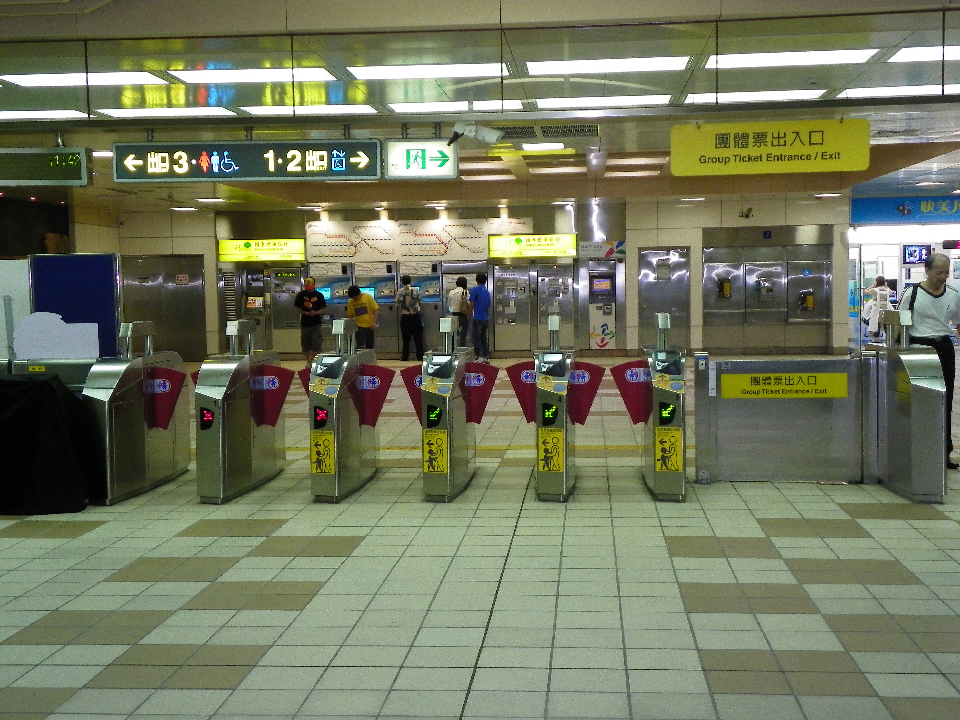 台北捷運土城駅改札口。